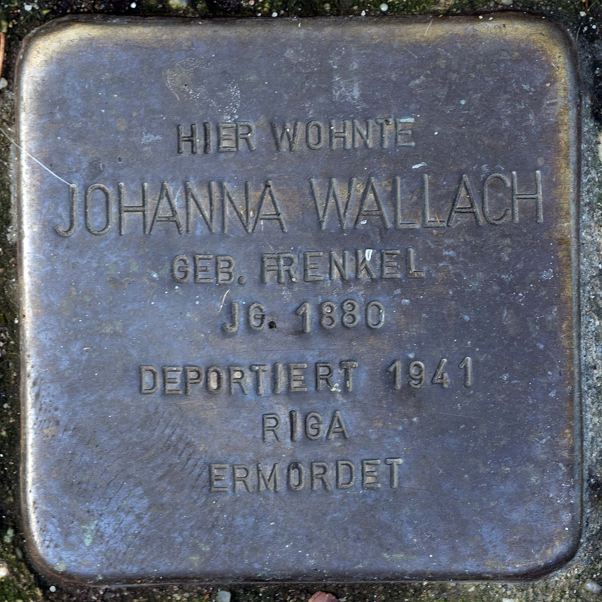 Stolperstein für Wallach Johanna